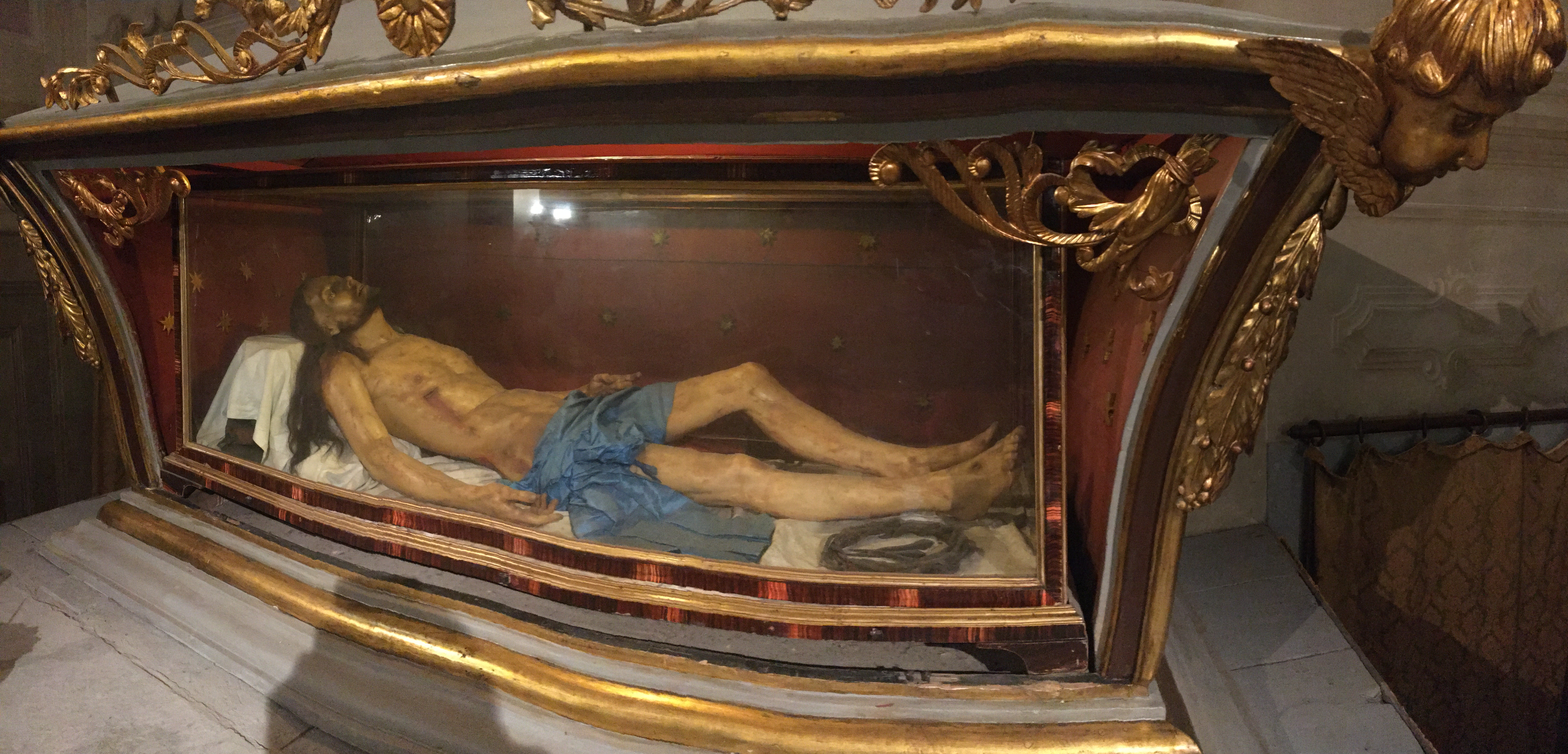 Il Cristo in cera di Clemente Susini esposto nell'oratorio della Misericordia di Vicchio. Anno realizzazione 1798.